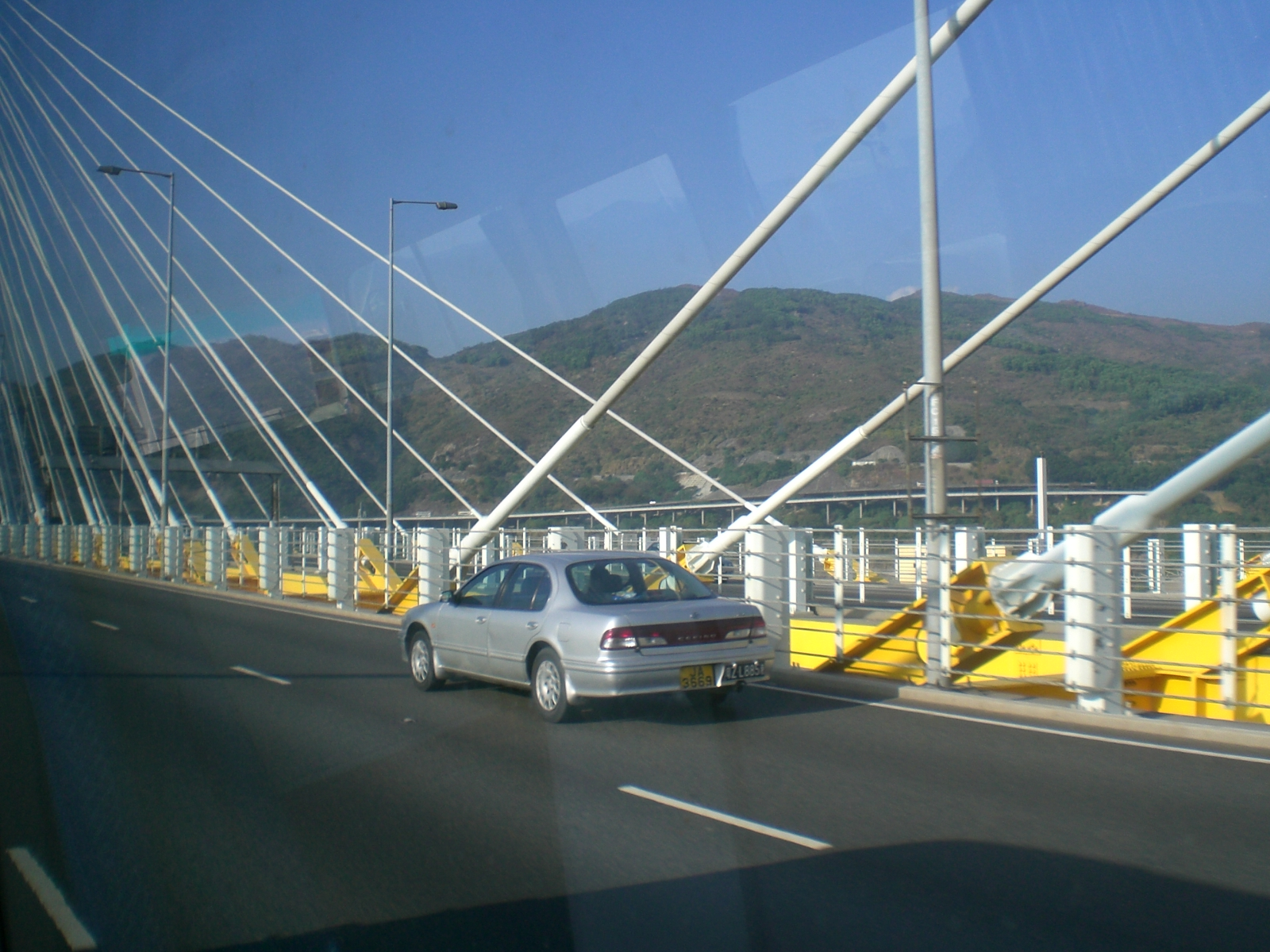 香港幹線編號系統香港3號幹線青朗公路汀九橋, Ting Kau Bridge